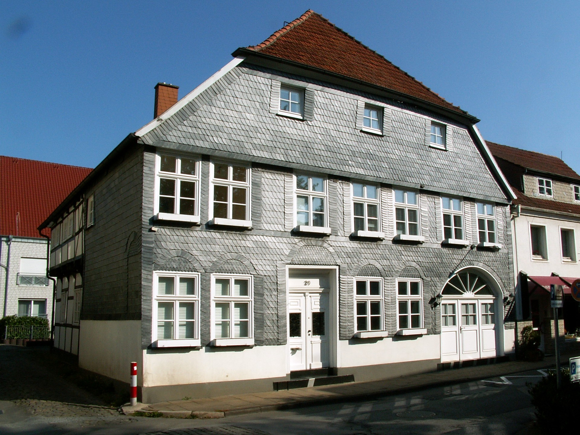 Fachwerkgiebelhaus in Herford, Holland 29, Baudenkmal Nr. 110, Ansicht von Süden